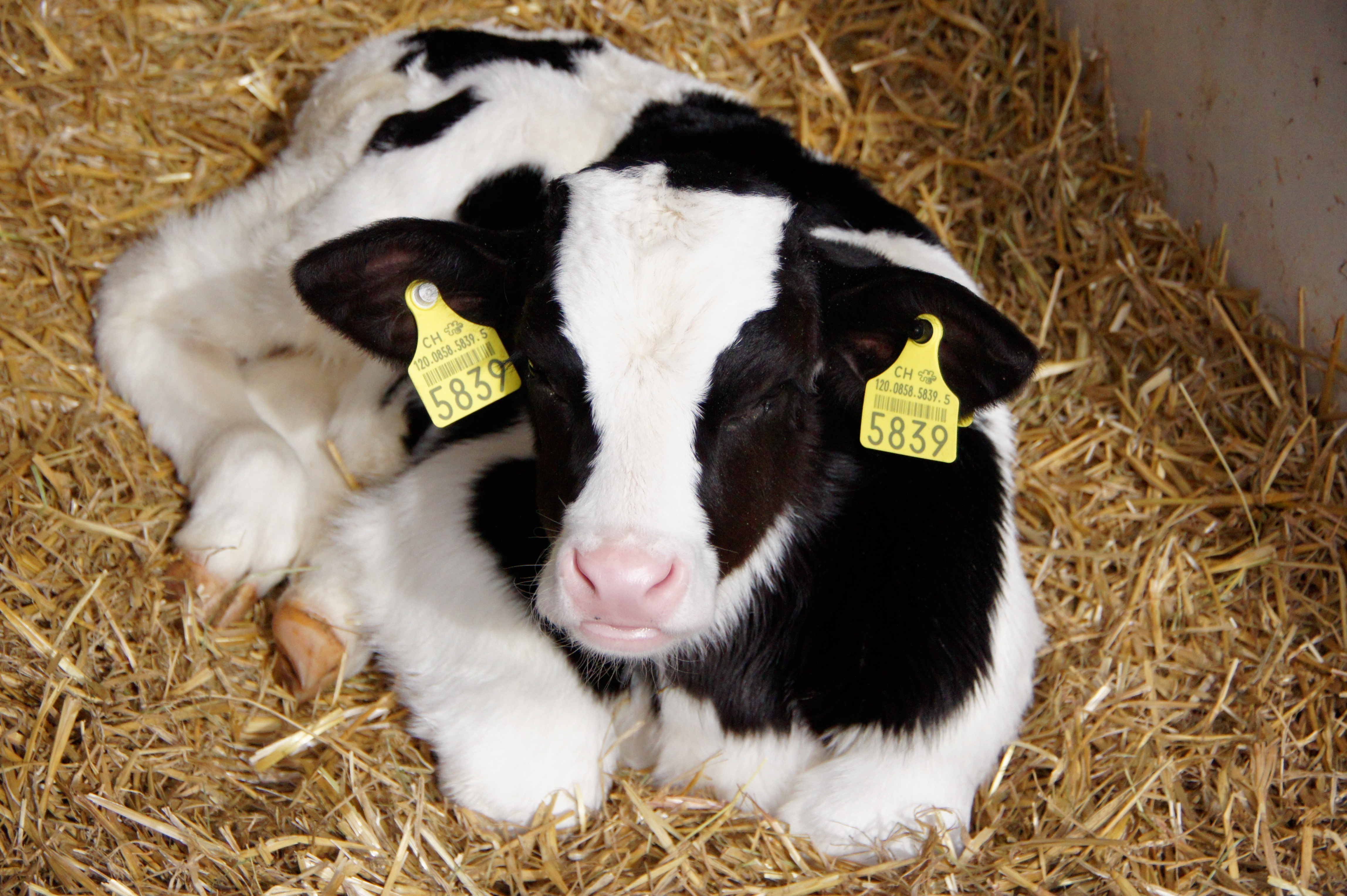 Ein Kalb in der Schweiz